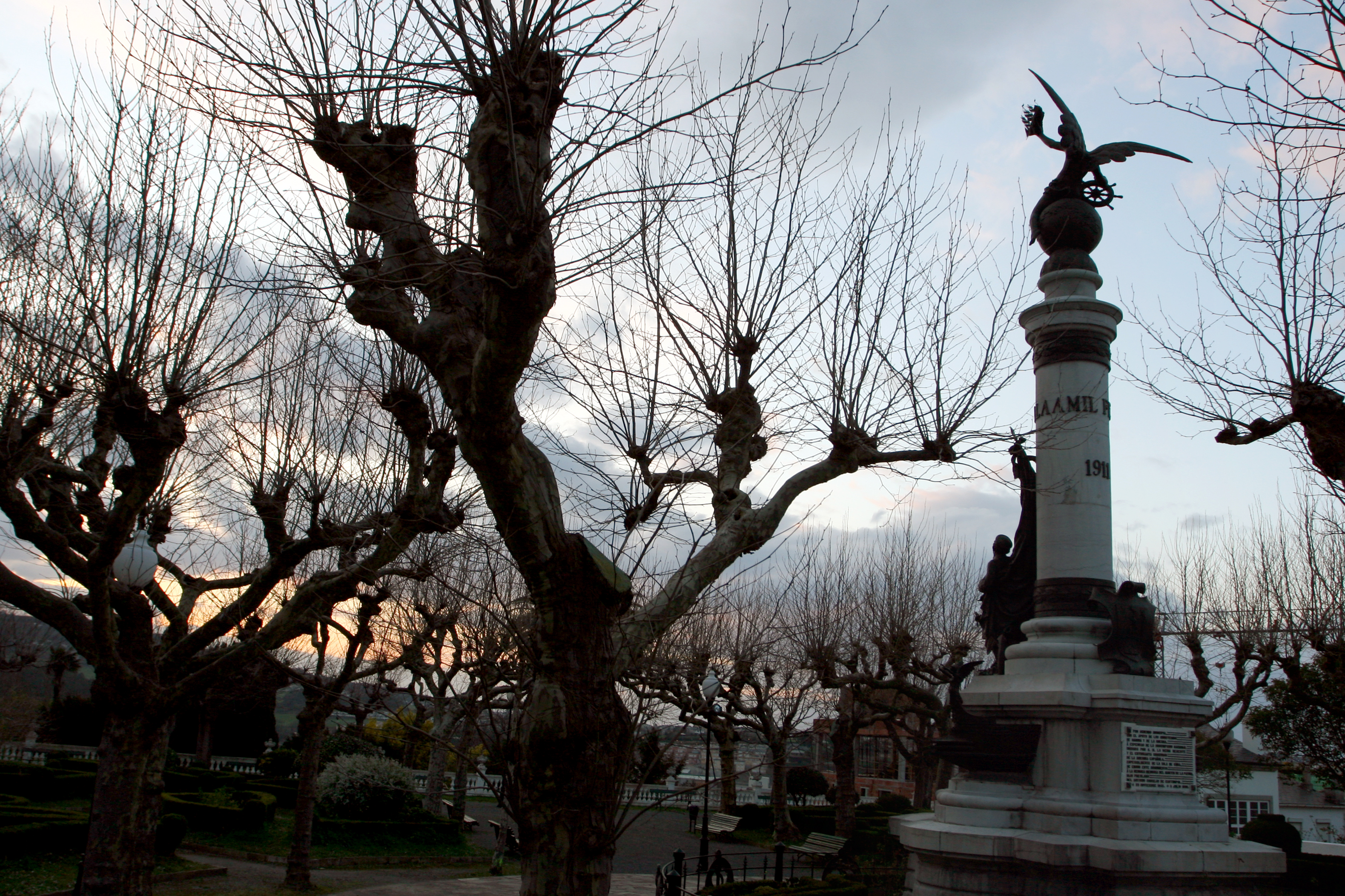 Conjunto Histórico de la Villa de Castropol